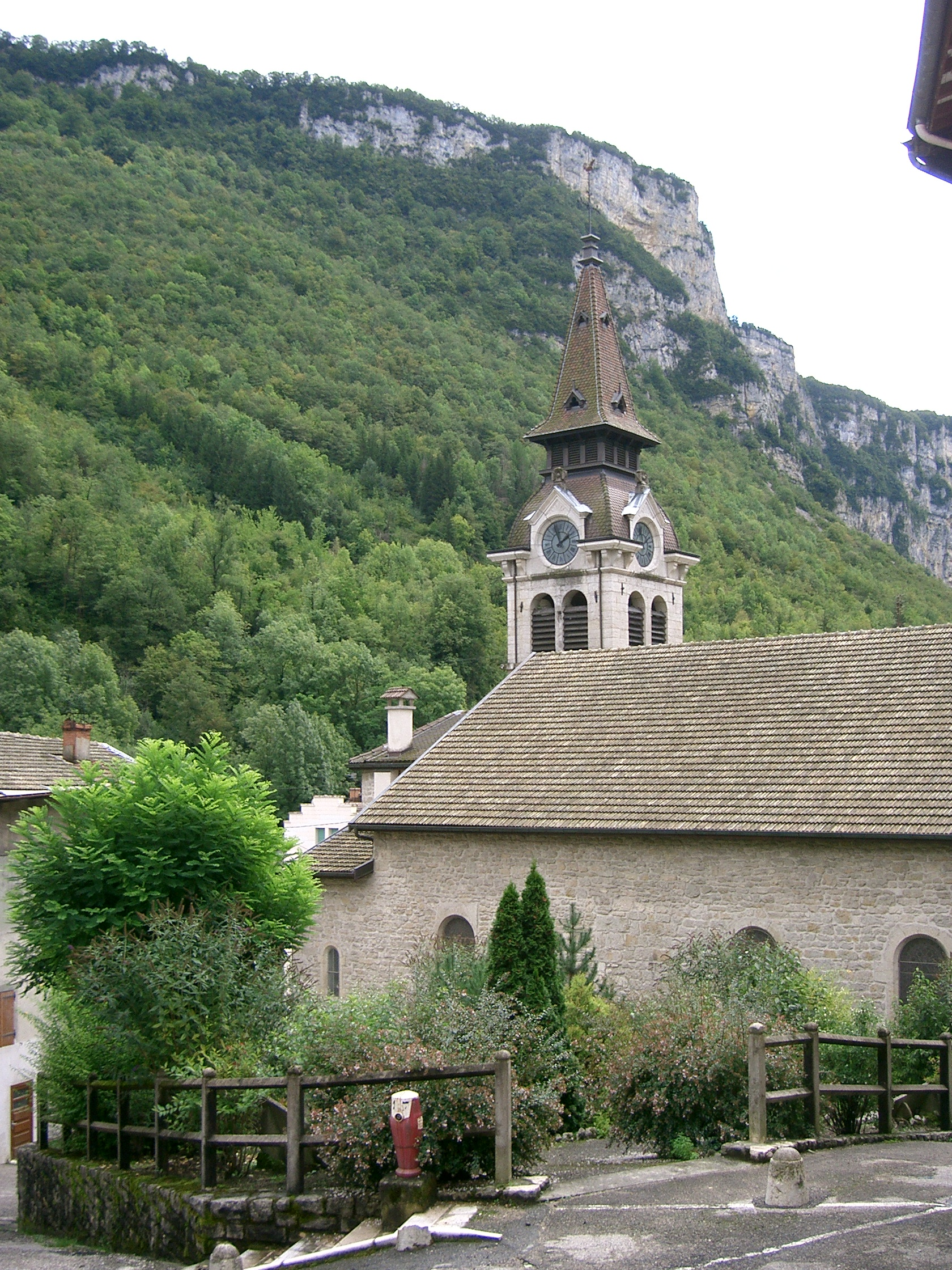 l'église de Tenay dans l'Ain